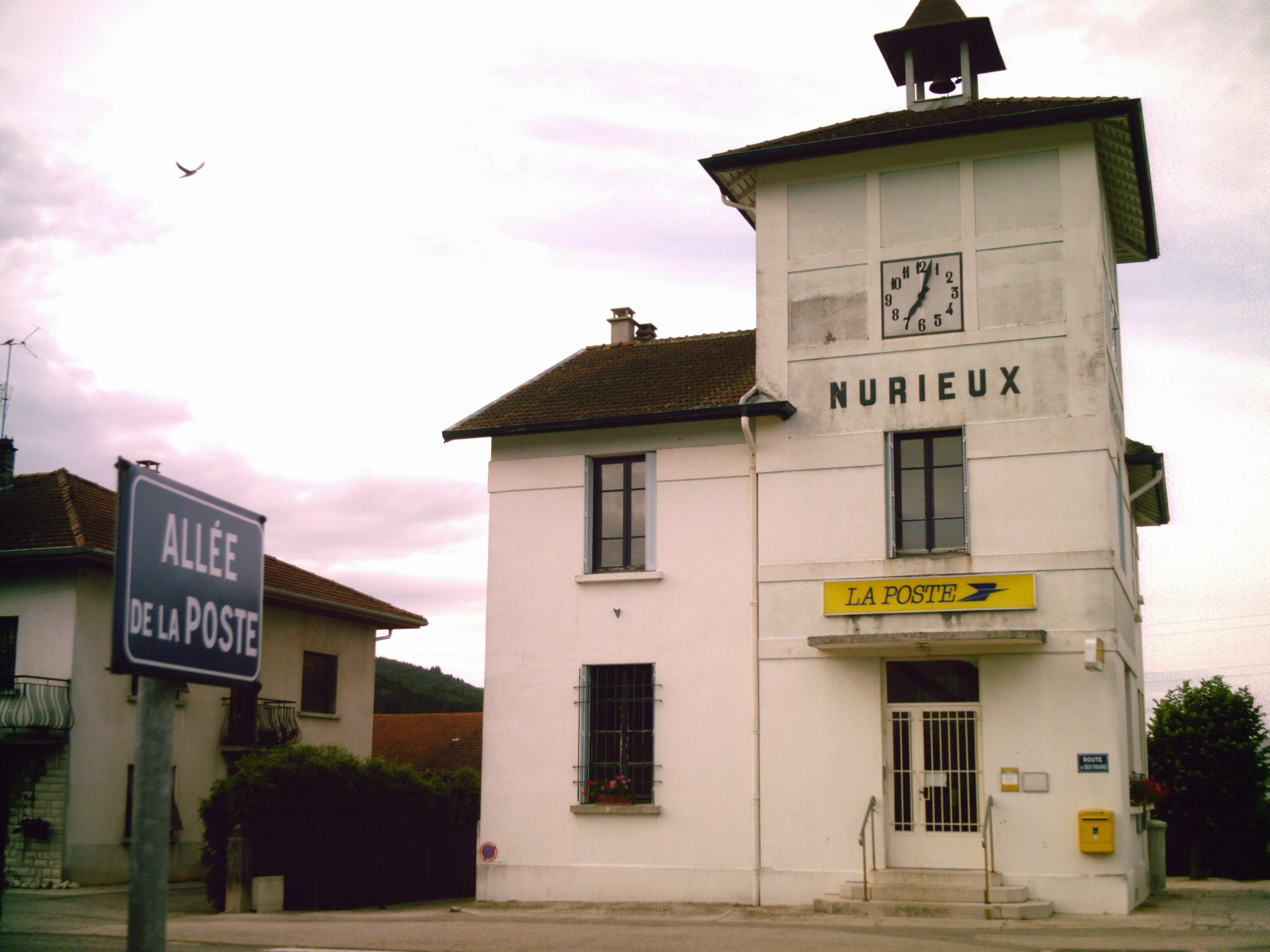 Le bureau de Poste de Nurieux-Volognat (Ain, FRANCE)